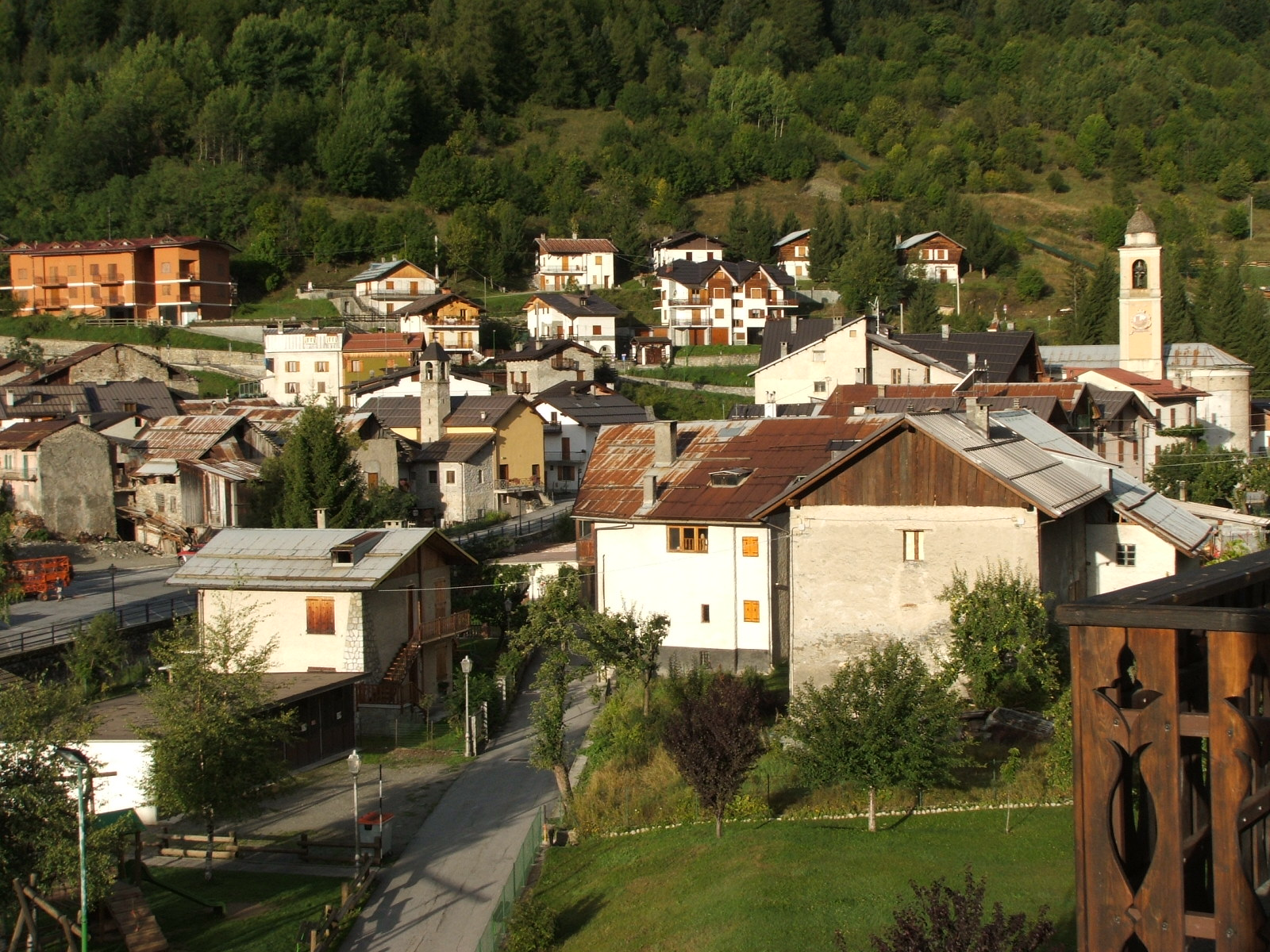 Immagine da Pietraporzio, valle Stura di Demonte, in provincia di Cuneo, Piemonte, Italia